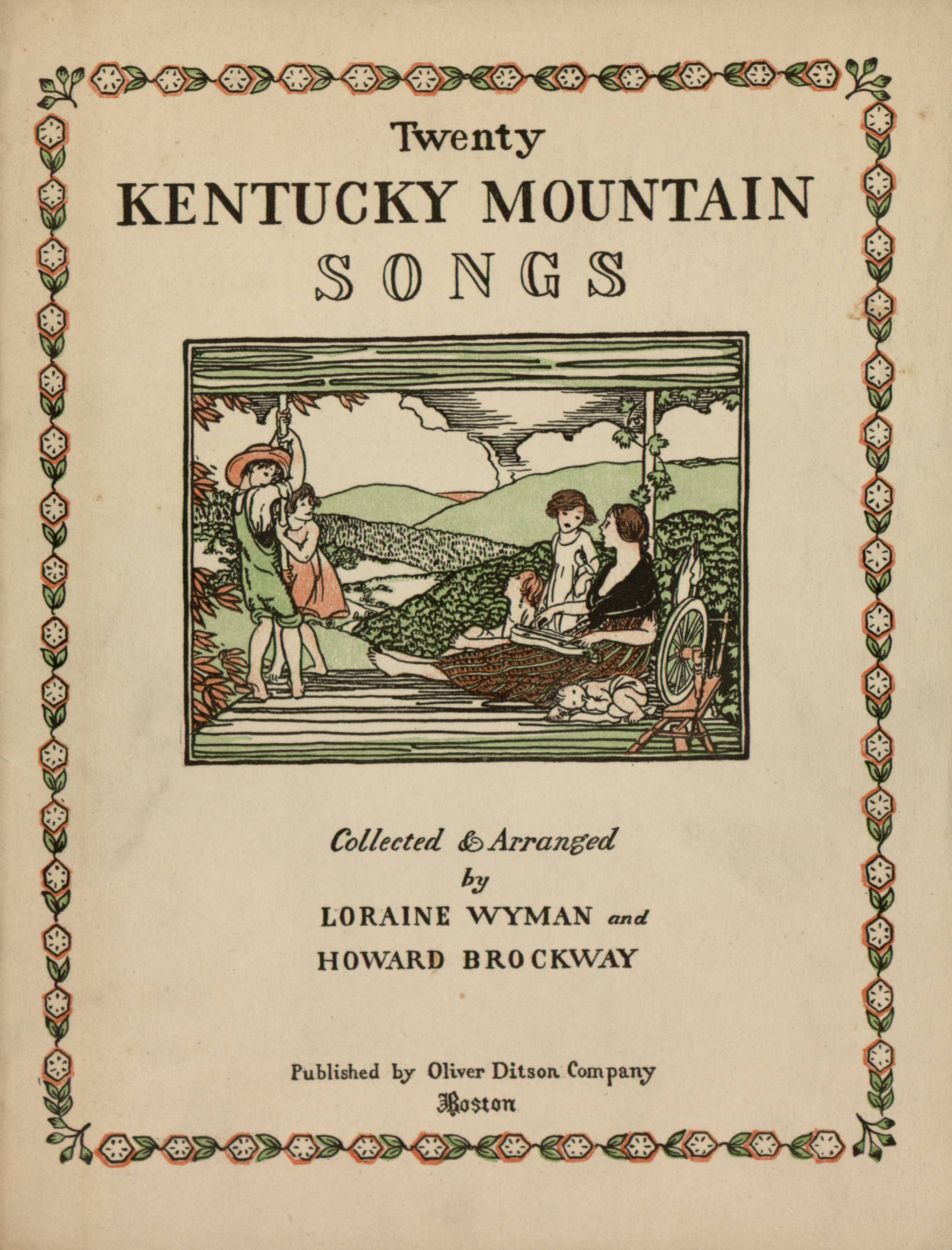 Coberta del llibre: Twenty Kentucky mountain songs / the words collected by Loraine Wyman ; the melodies collected and piano accompaniments added by Howard Brockway.-- Boston : Oliver Ditson & Co., [1920]